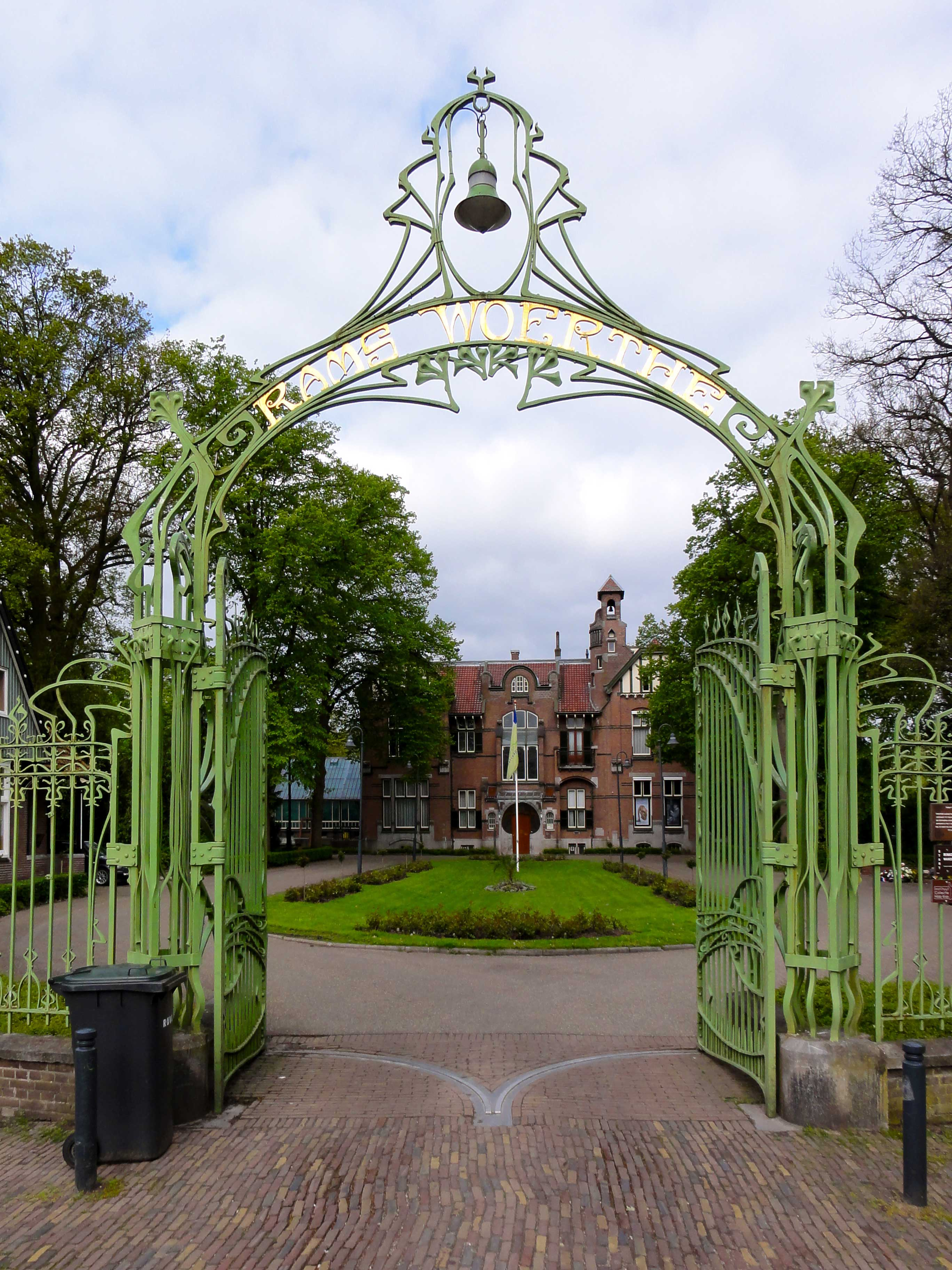 Toegangshek naar Rams Woerthe (rijksmonument)